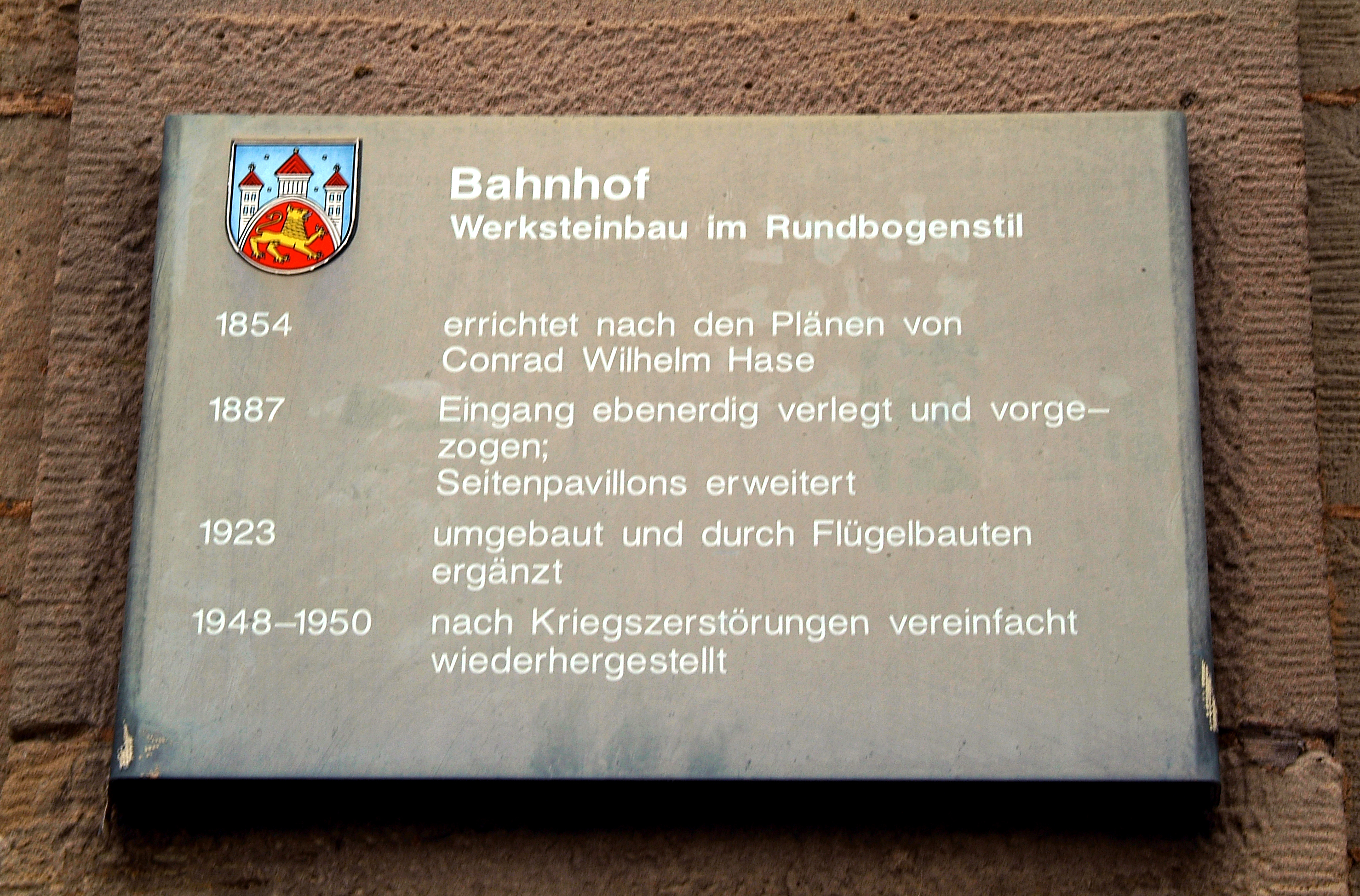 Stadttafel Göttingen "Bahnhof / Werksteinbau im Rundbogenstil", nichtnummerierte Info-Tafel in deutscher Sprache mit Bau-Angaben zu insgesammt vier baulichen Zeiträumen des Göttinger Personenbahnhofs.